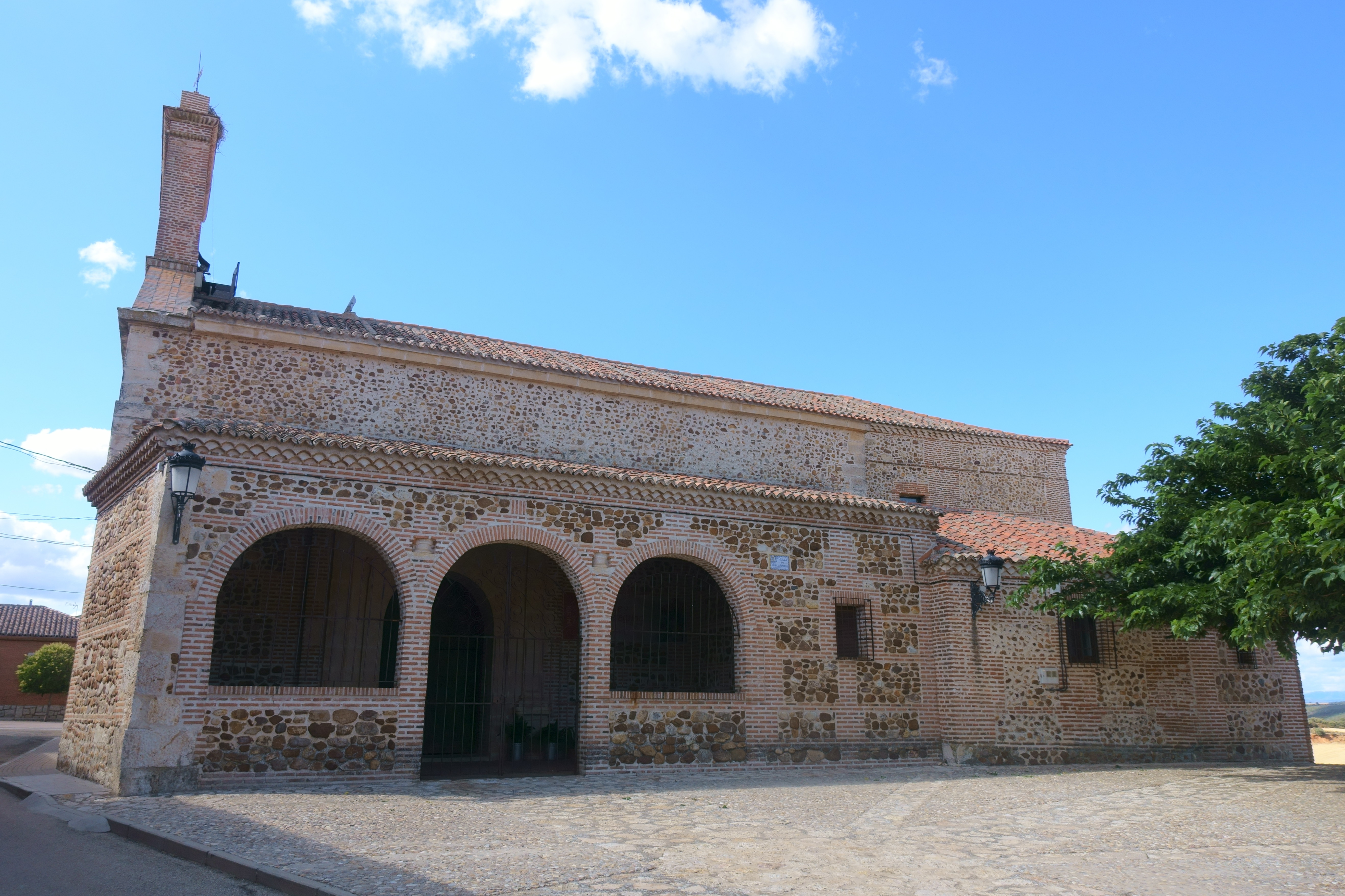 Iglesia de San Lorenzo, Viñuelas (Guadalajara, España).